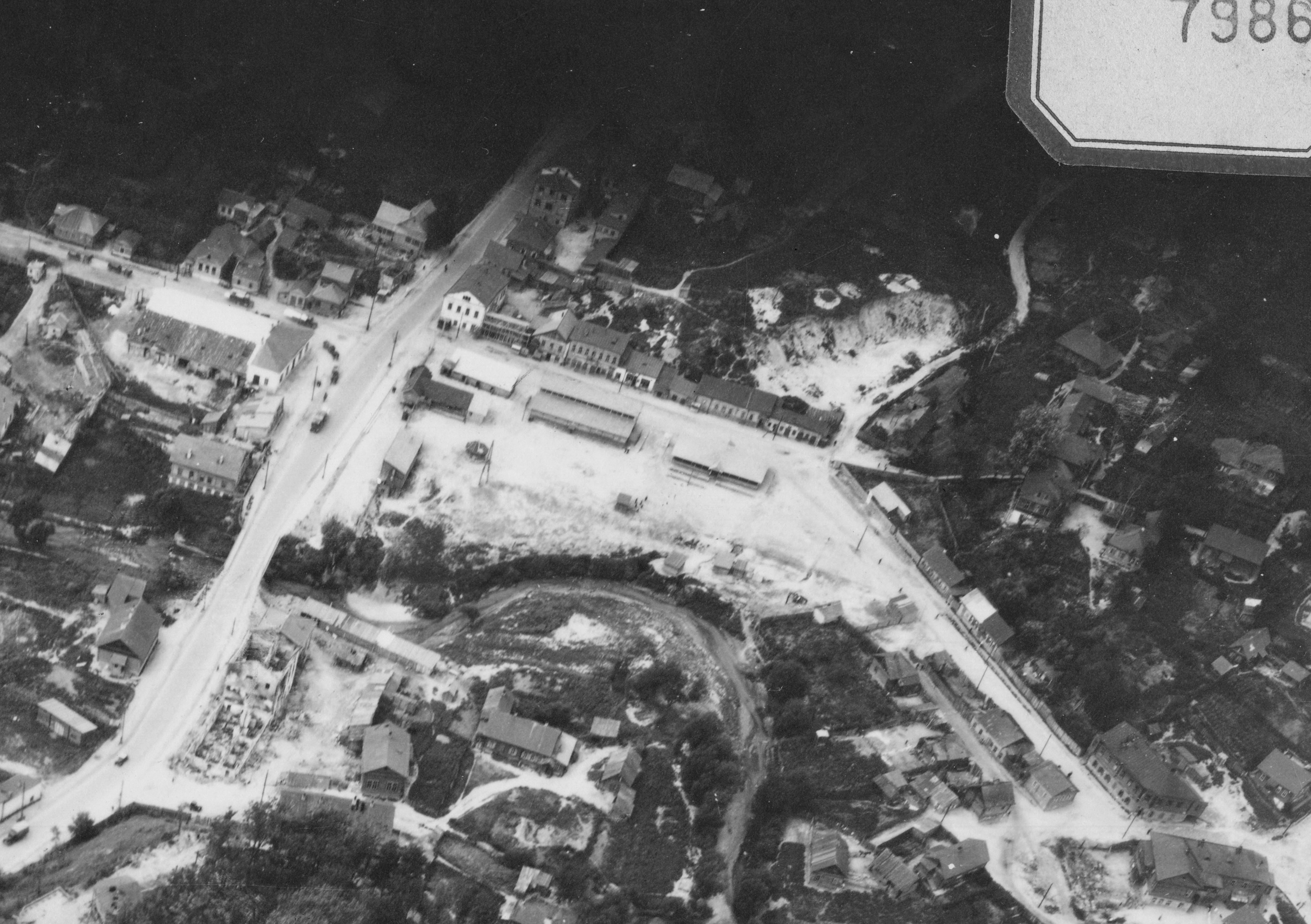 Магілёў. Нямецкі аэрафотаздымак